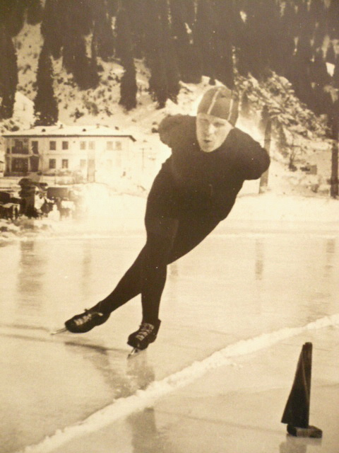 Чемпион СССР 1948 года Г.Пискунов